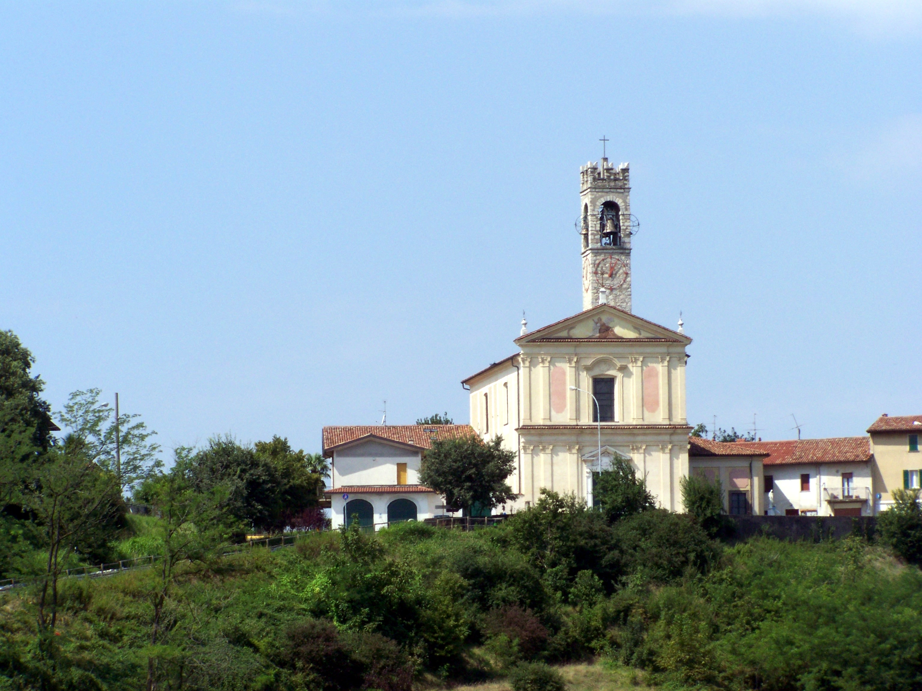 Complesso della chiesa parrocchiale di Calino, dedicata all'arcangelo Michele, visto dai piedi del rilievo collinare calinese.